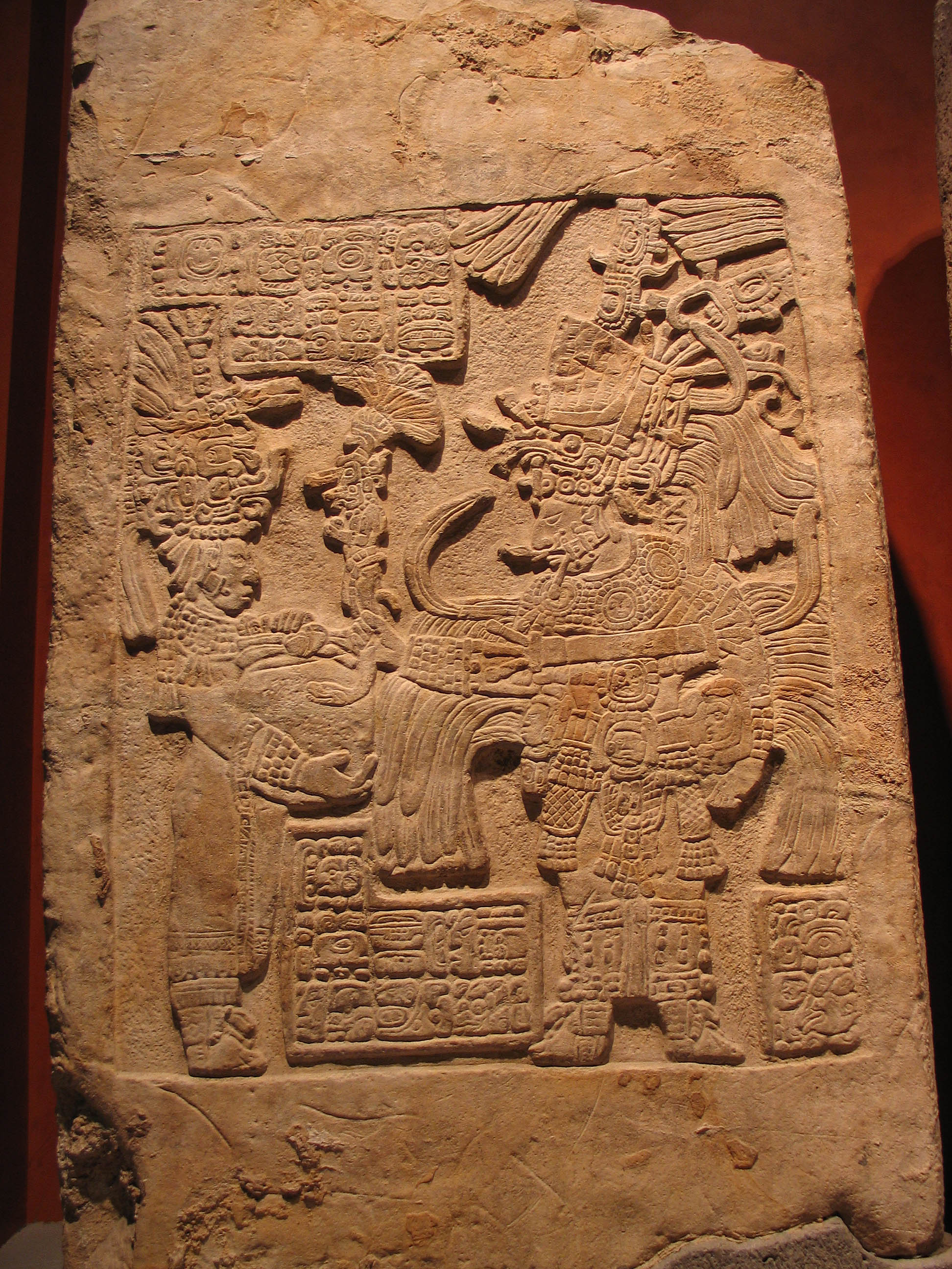 Lintel Nr. 53, Yaxchilán, Nationalmuseum für Anthropologie, Mexiko-Stadt Photograph: Luidger 29. Dezember 2004